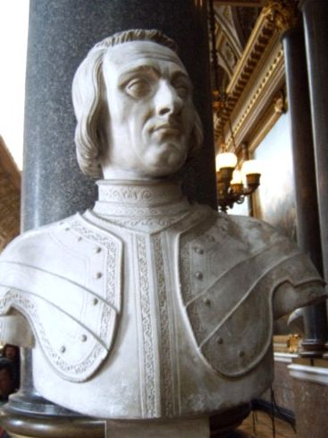 Denis Foyatier (1893-1863), Jacques II de Chabannes, seigneur de La Palice, maréchal de France, 1838, buste en marbre sur piédouche, Versailles, musée des châteaux de Versailles et Trianon, galerie des Batailles.